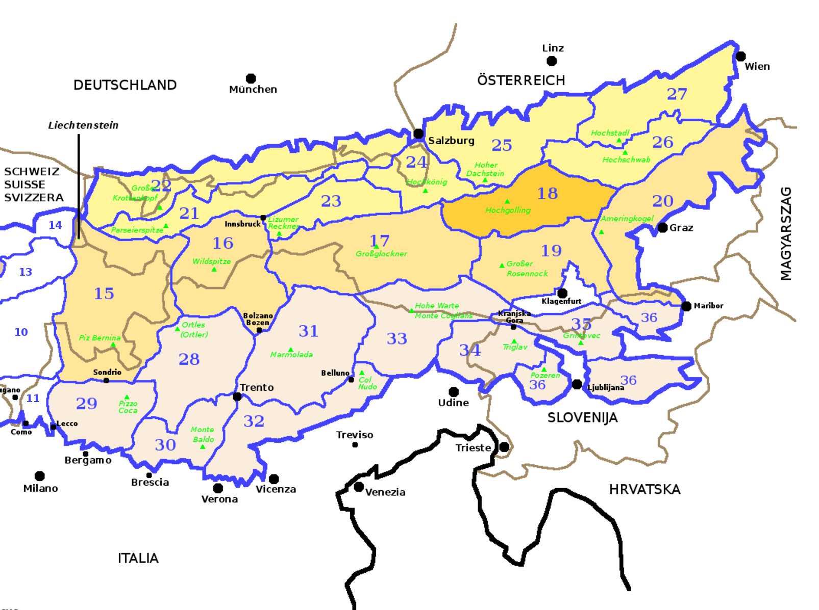 Alpi Orientali secondo la SOIUSA con evidenziate le Alpi dei Tauri orientali